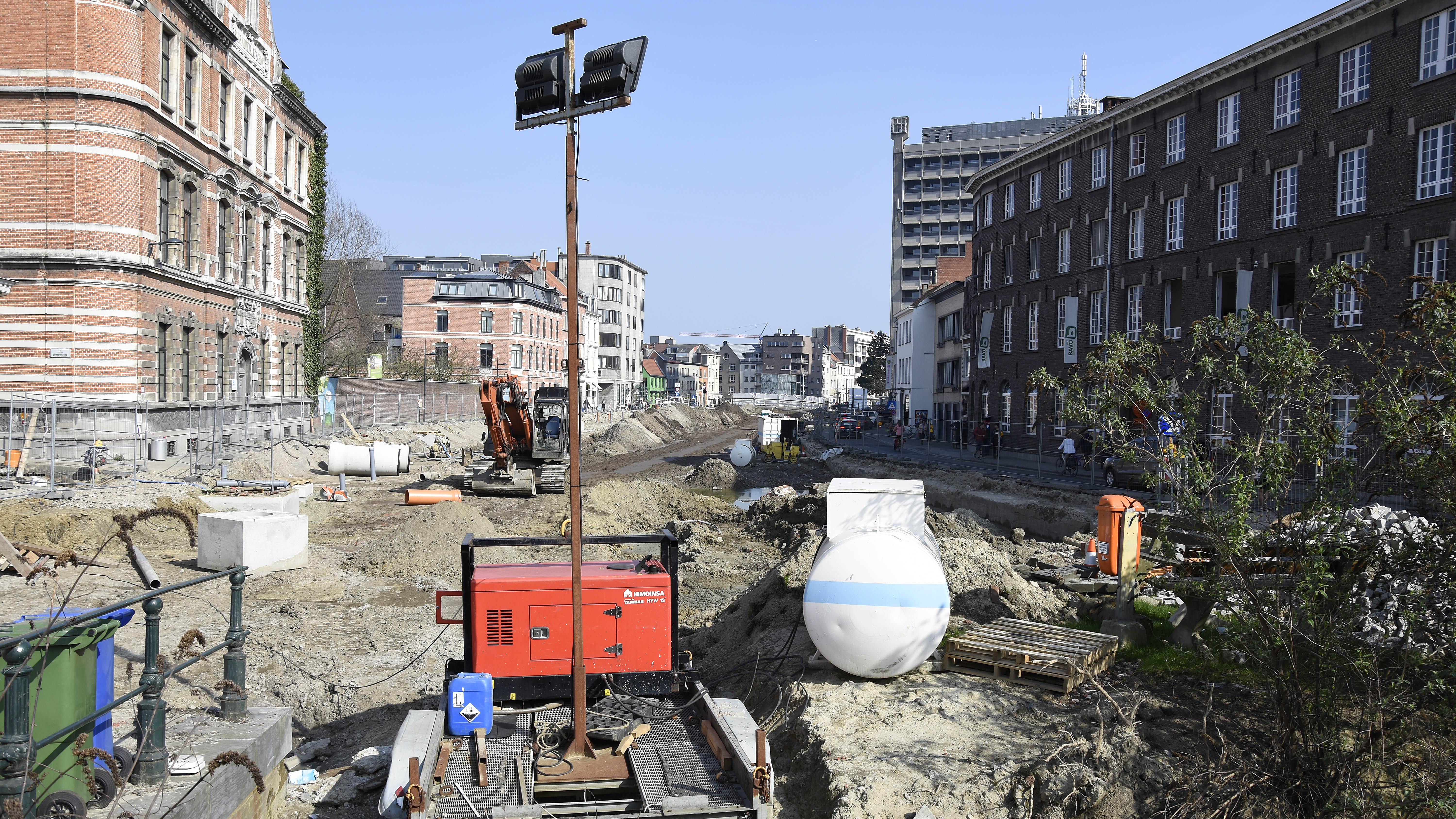 Gent - het openleggen van de gedempte Nederschelde - situatie 16 maart 2017